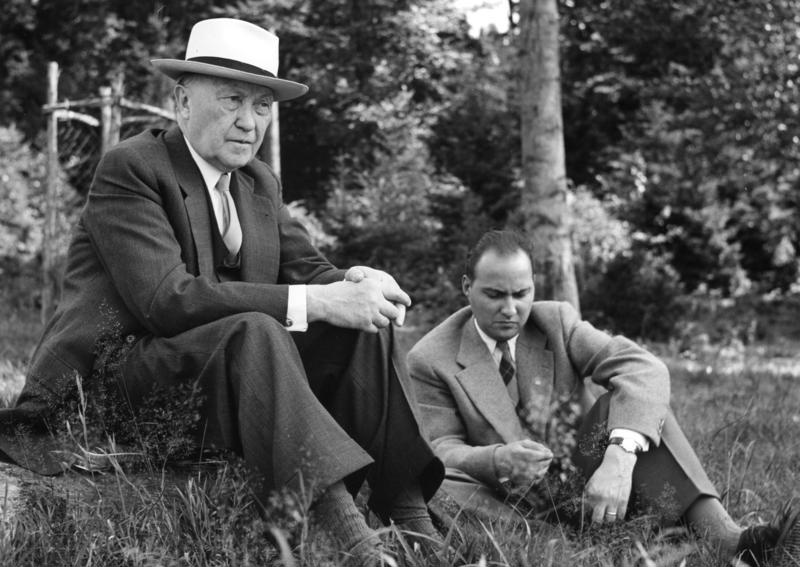 17.8.1956 Bundeskanzler Konrad Adenauer im Urlaub auf Bühlerhöhe/Schwarzwald Neben ihm sein jüngster Sohn Georg